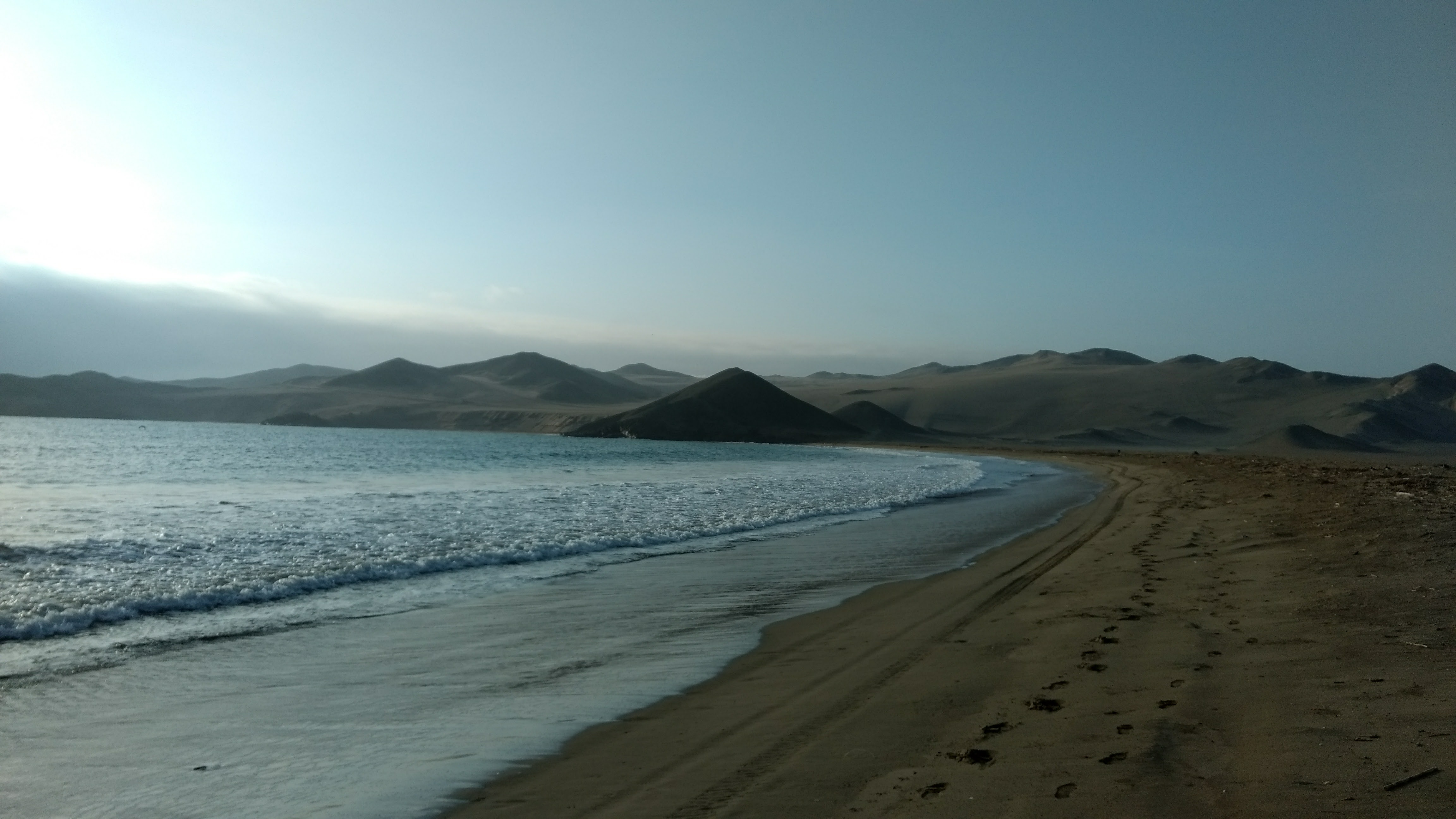 HERMOSA PLAYA CON UN MARAVILLOSO ATARDECER CASMEÑO